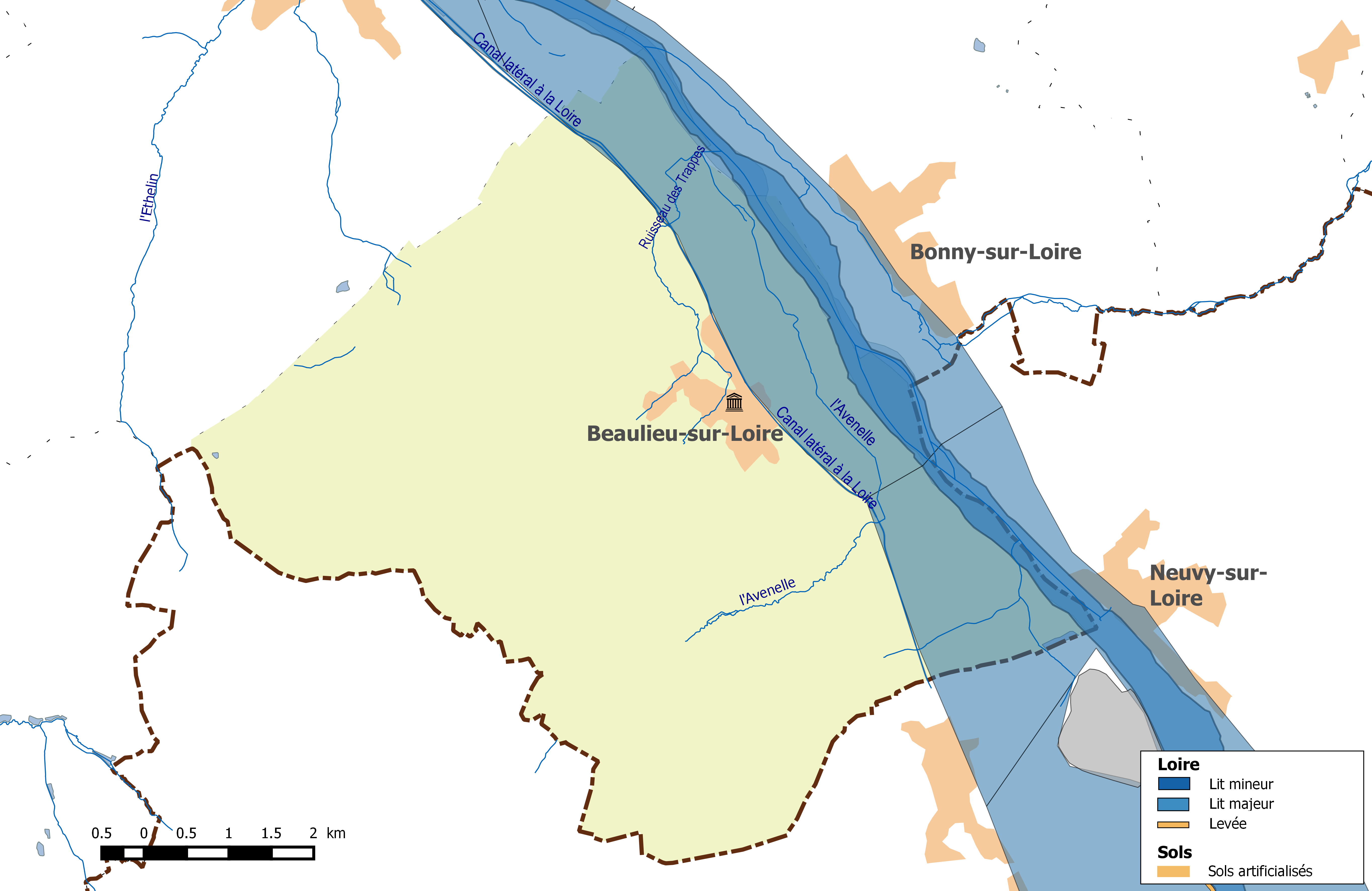 Zone inondable de la commune de Beaulieu-sur-Loire, dans le Loiret (France)